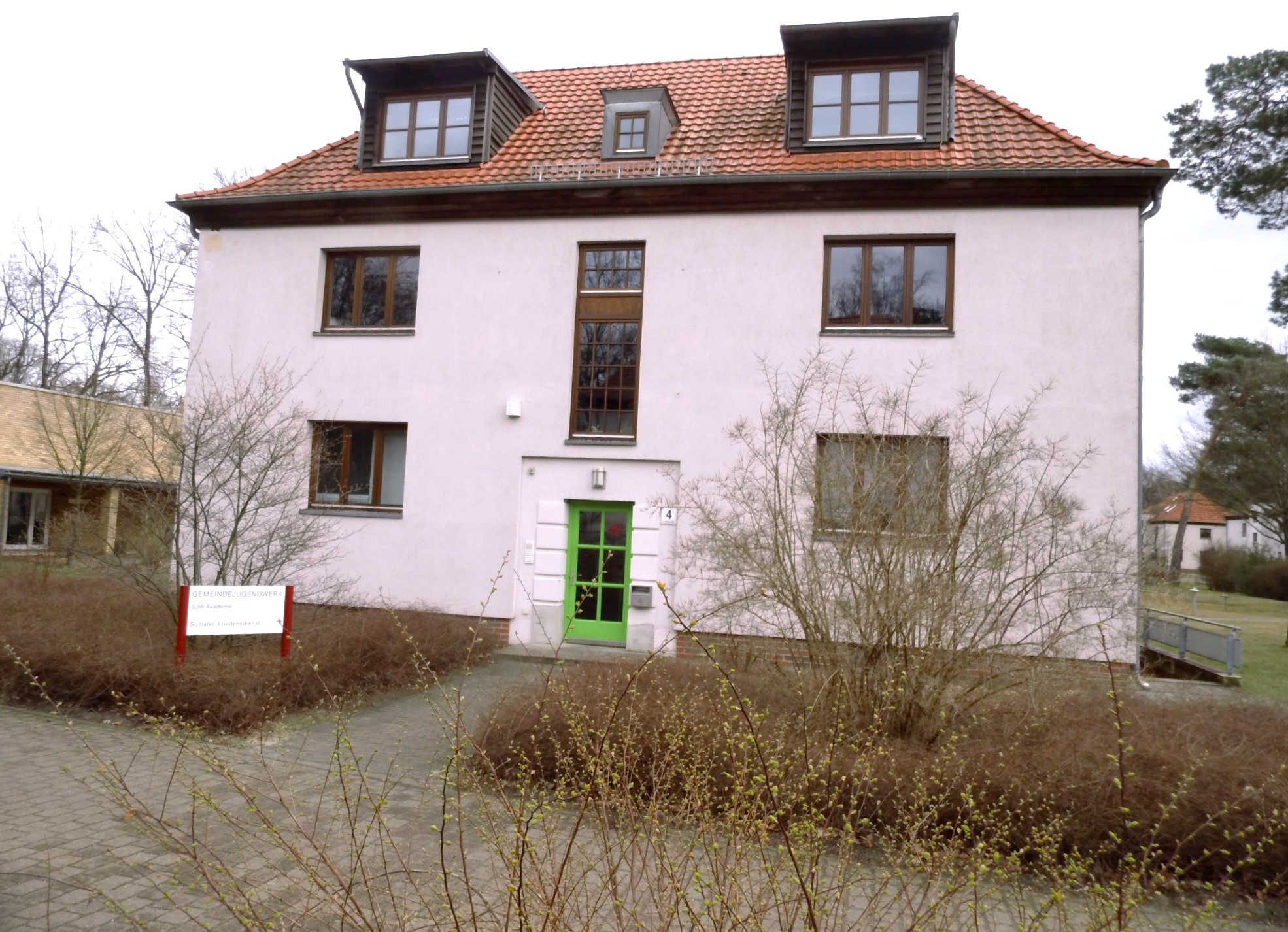 Verwaltungsgebäude des deutschen baptistischen Gemeindejugendwerkes in Wustermark-Elstal, Deutschland